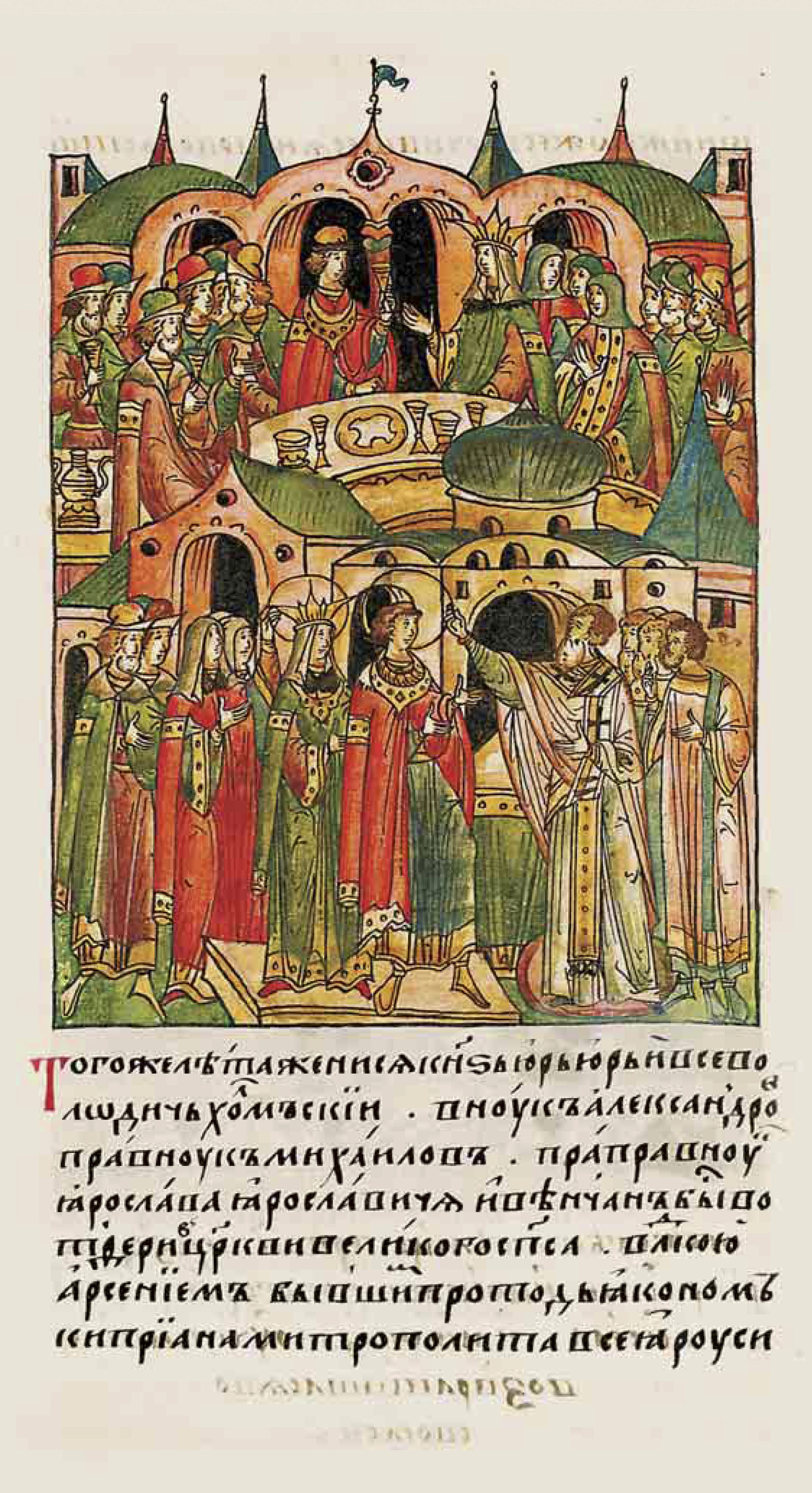 ЛИЦЕВОЙ ЛЕТОПИСНЫЙ СВОД: В том же году женился князь Юрий Всеволодович Холмский, внук Александров, правнук Михайлов, праправнук Ярослава Ярославича, и обвенчан был в Твери в церкви великого Спаса владыкой Арсением, бывшим протодьяконом митрополита всея Руси Киприана.